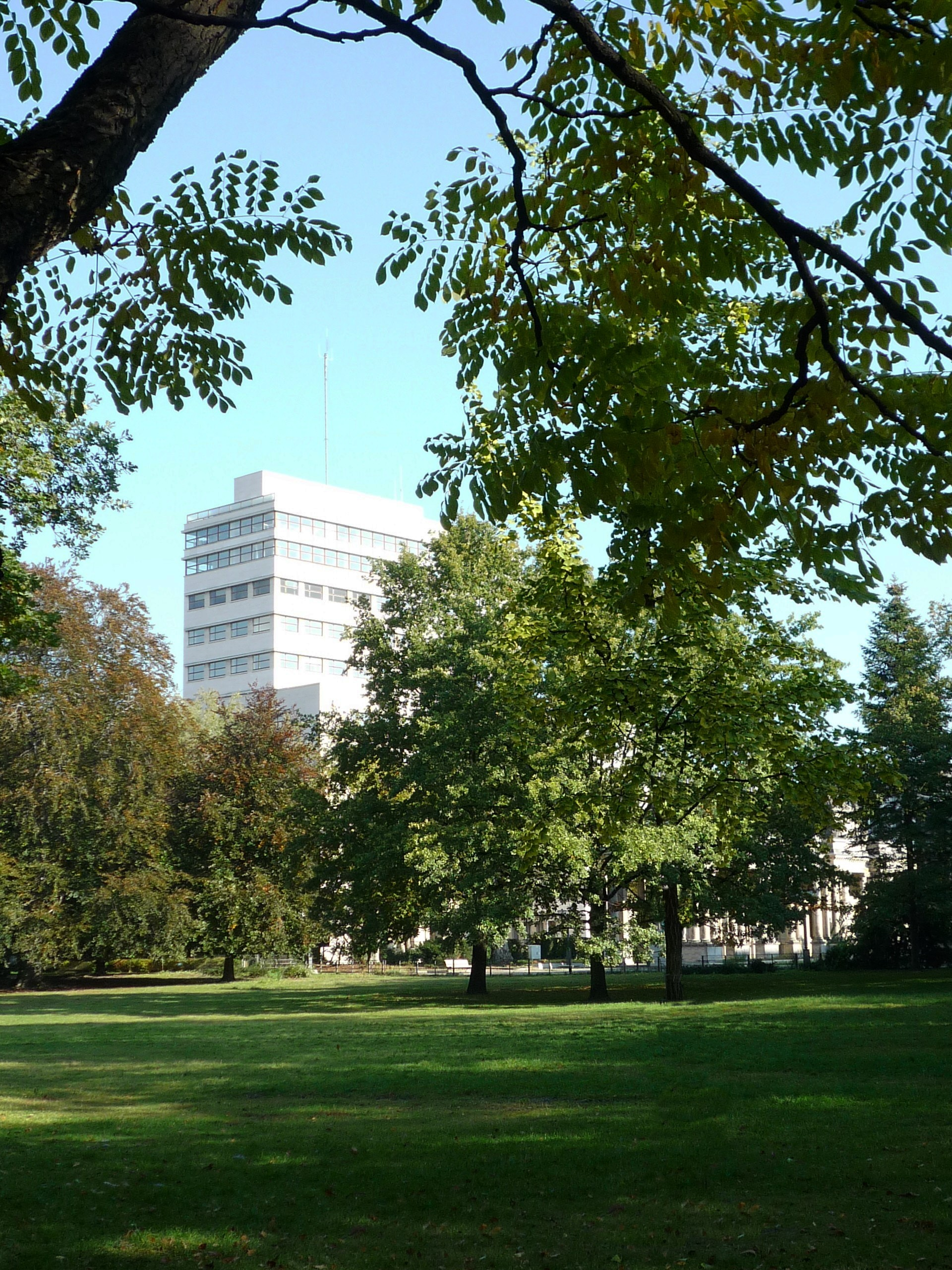 Heinrich-von-Kleist-Park in Berlin-Schöneberg. Teilansicht mit Blick auf das "Kathreiner-Haus" von Bruno Paul.